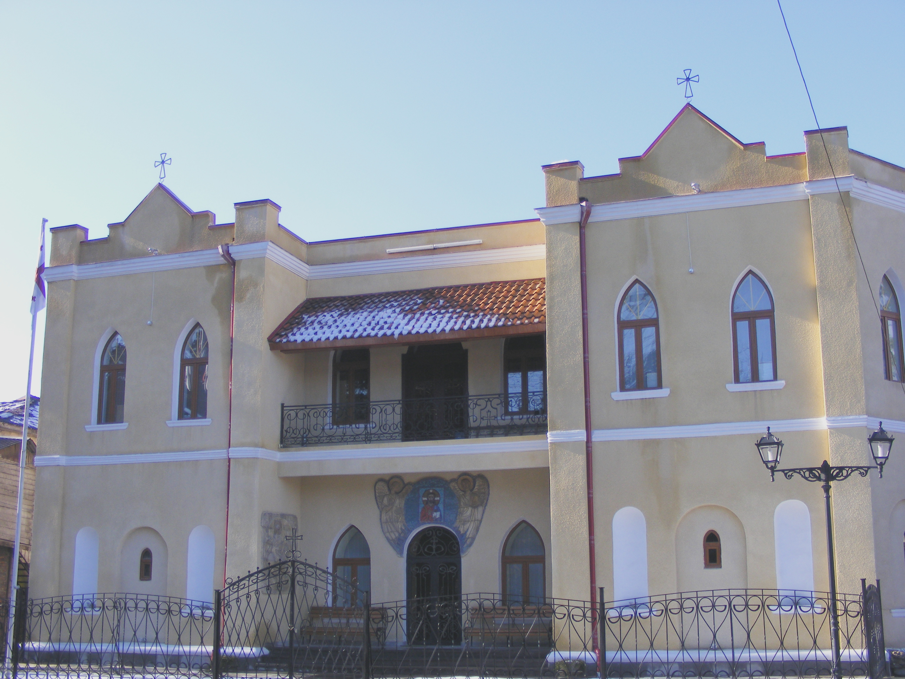 Ozurgeti